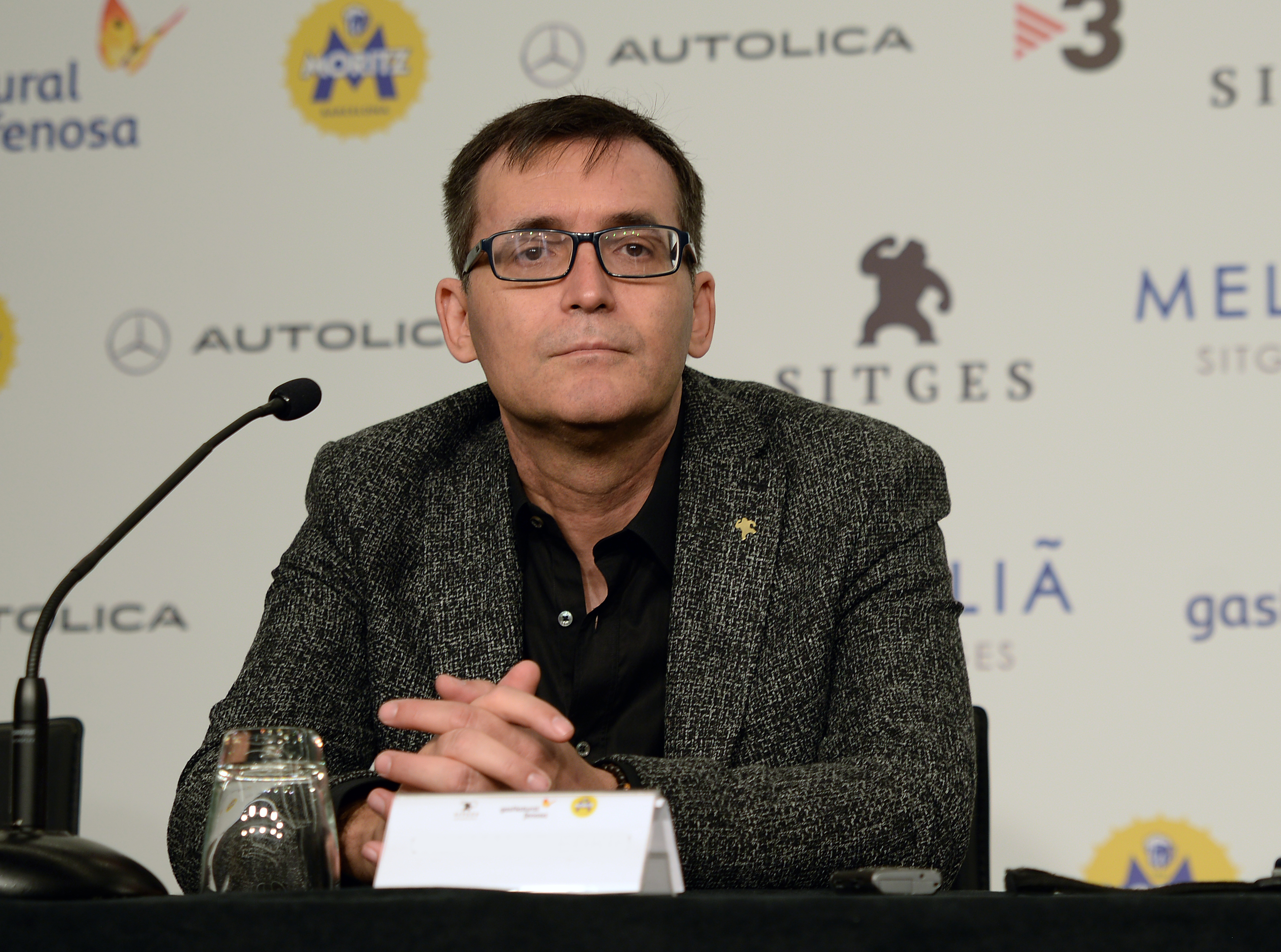 Àngel Sala, fotografiat durant el Festival Internacional de Cinema Fantàstic de Catalunya (Sitges, 2017), director del certamen